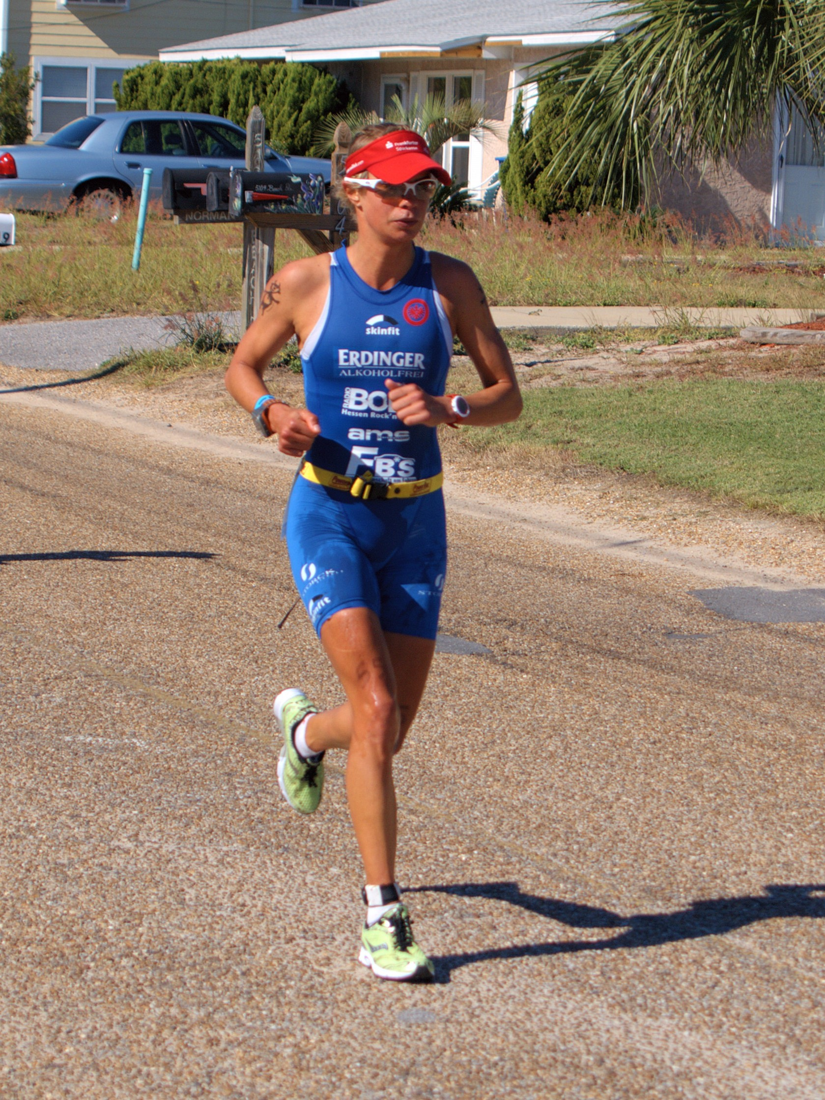 Meike Krebs at Ironman Florida 2010